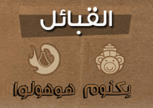 قبائل جزر عيش سفاري